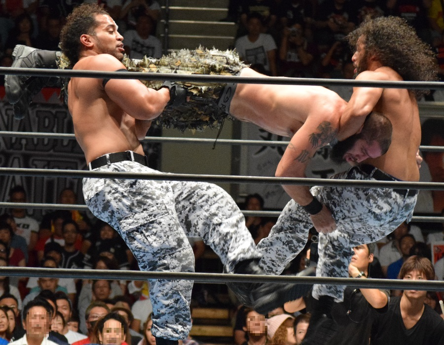 2016年9月25日 ワールド記念ホール「DESTRUCTION in KOBE」 マーク・ブリスコにゲリラ・ウォーフェアを決めるゲリラズ・オブ・デスティニー（タマ・トンガ & タンガ・ロア）